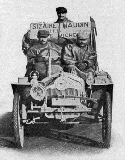 New-york-Paris 1908, la Sizaire-Naudin de Pons, Deschamps et Berlhe - La Vie au Grand Air du 8 février 1908, p.84